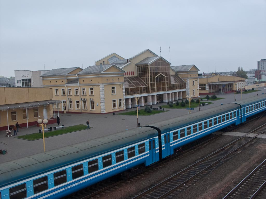 Беларусь: обл.Гомелевская: Жлобин: ж/д вокзал; 15:49 01.11.2008